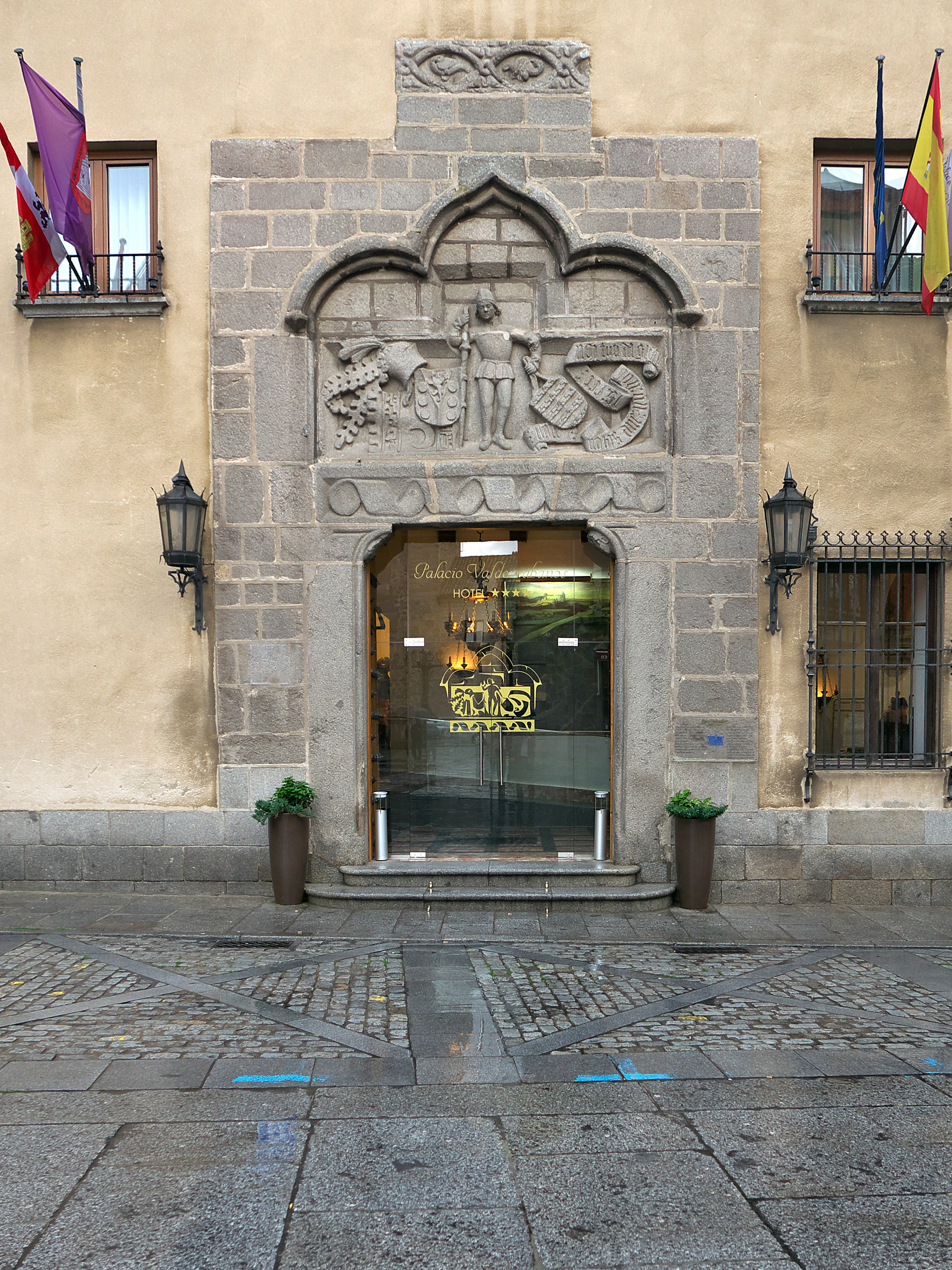 Palacio de Gonzalo Dávila (s. XV), regidor de Jerez de la Frontera.